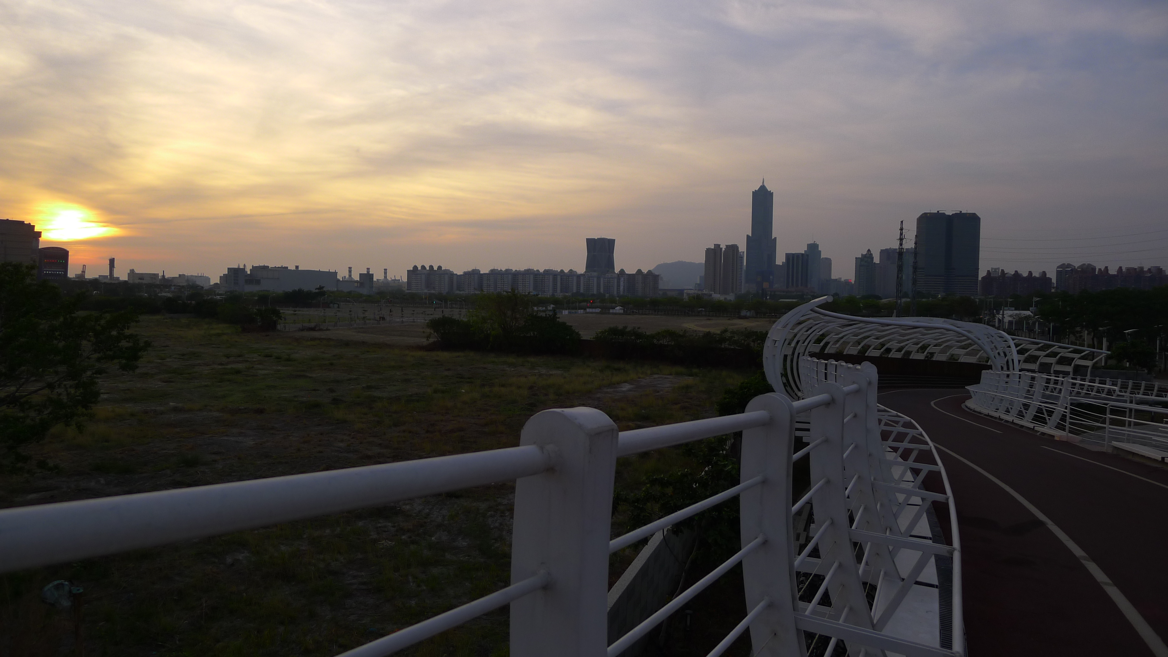 中文（台灣）: 前鎮之星自行車橋看亞洲新灣區用地